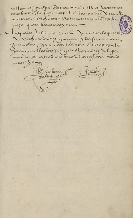 Corresponde a la última parte de la declaración jurada de Diego Huallpa, 31-XII-1572.